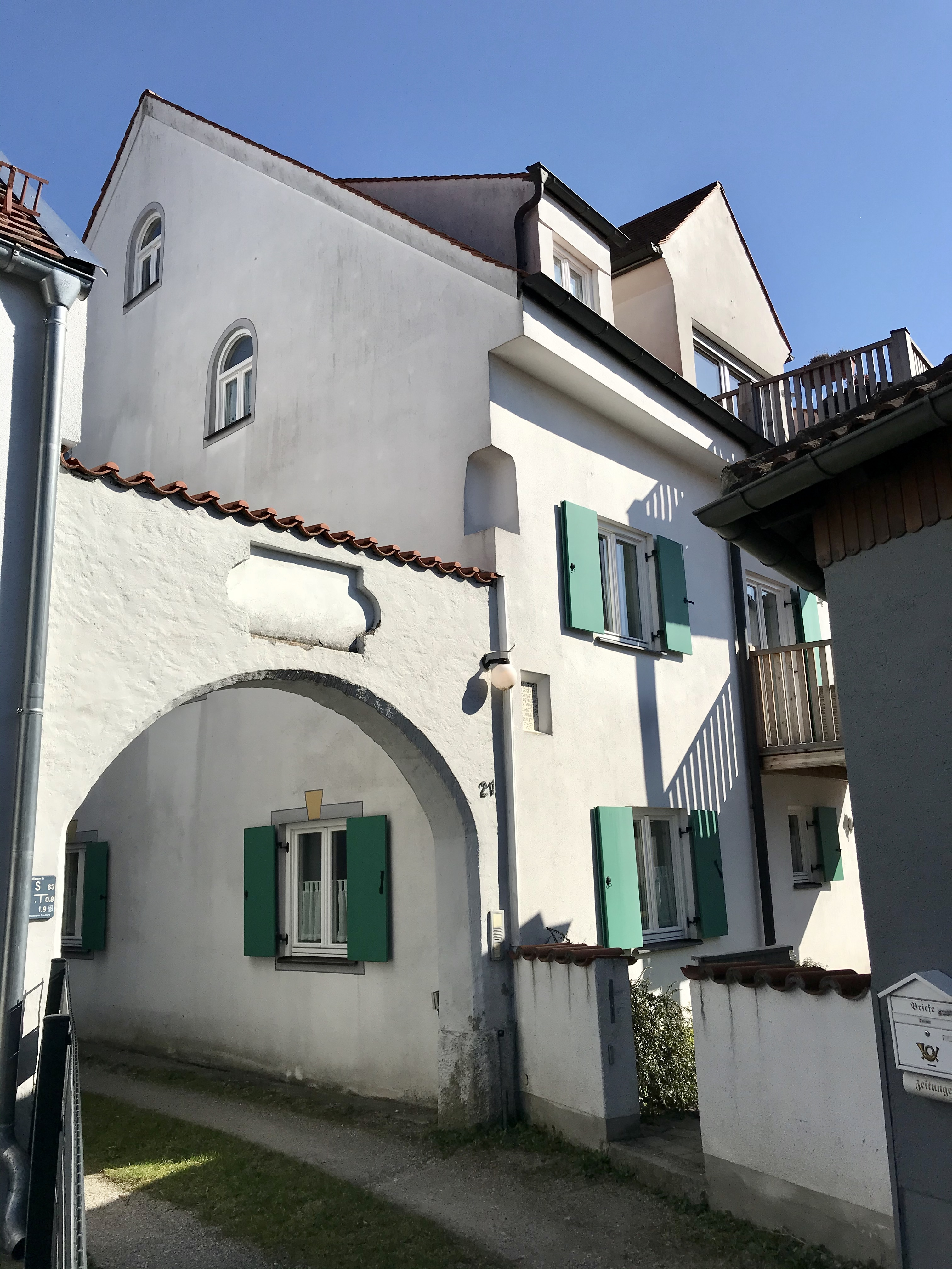 Unterm Berg 21 in Friedberg (Bayern). Ehemalige Werkstatt der Barockbildhauer Bartholomäus und Johann Caspar Öberl. Im Spanischen Erbfolgekrieg 1700 zerstört und 1705 wieder aufgebaut